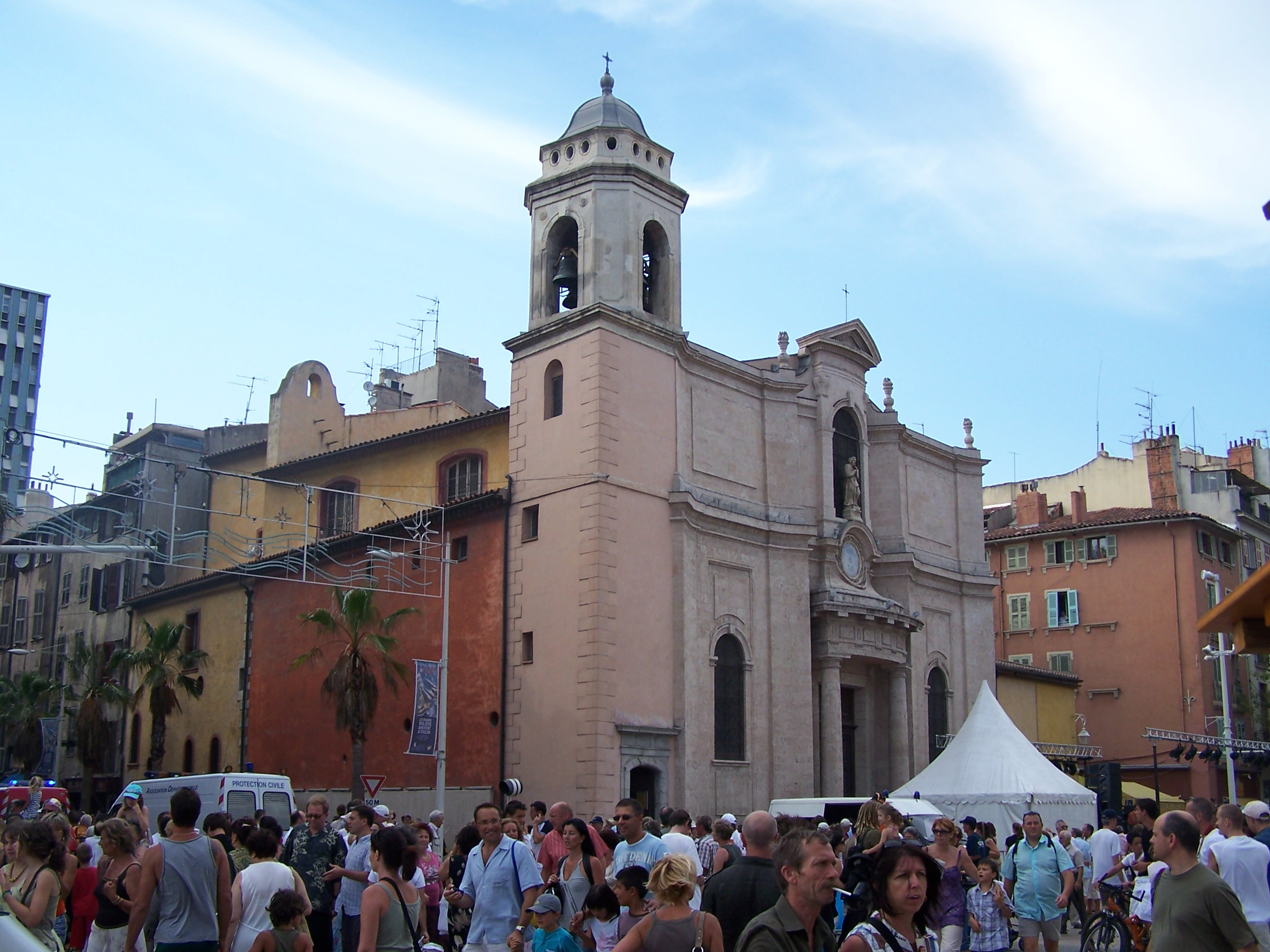 Vue de l'église du cours Lafayette